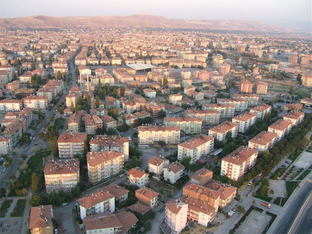 Aksaray City